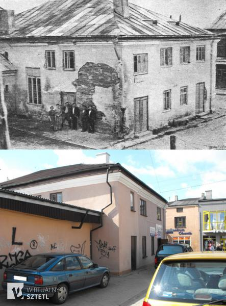 בתמונה למעלה ניתן לראות את בית הכנסת העתיק בסוקולוב פודלסקי ובתמונה מתחתיו ניתן לראות את אותו הבניין כיום המשמש כחנות בגדים